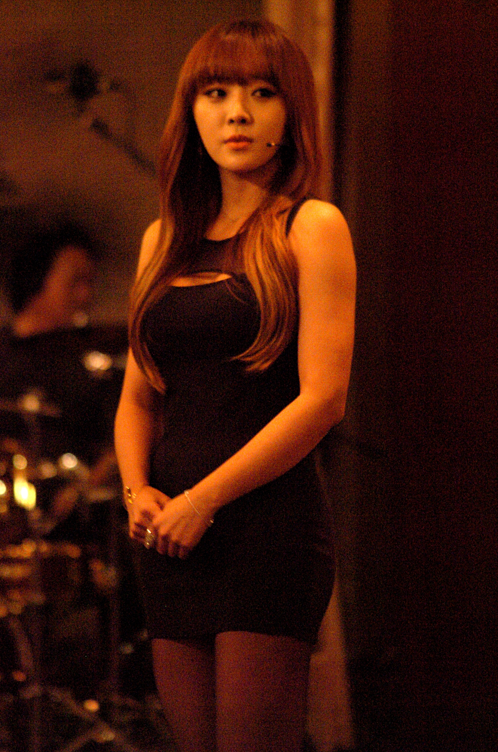 2013년 3월 27일 서울 롯데호텔에서 열린 뮤지컬 《남자가 사랑할 때》 제작발표회에 참석한 브라운 아이드 걸스의 나르샤.